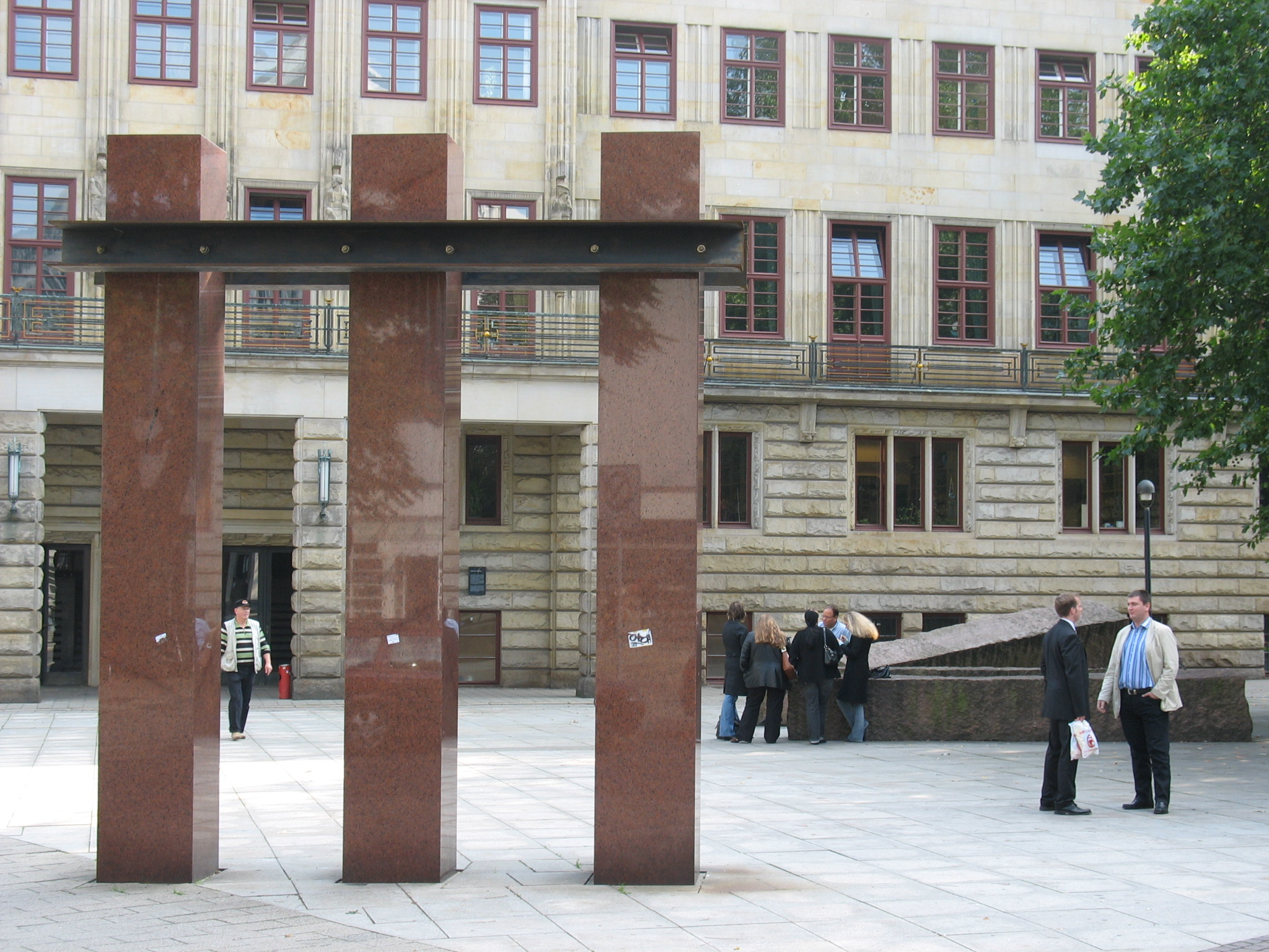 Bremen, Bahnhofsvorstadt, Haus des Reichs, Skulptur "Fragment"